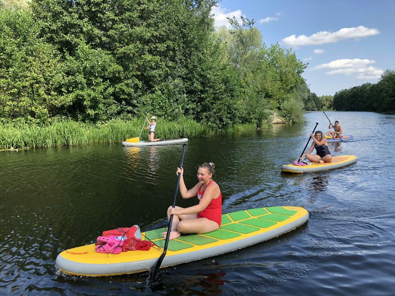 Подорож